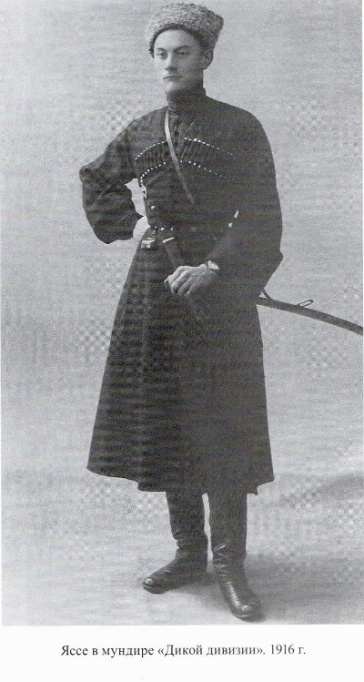 Яссе Андроников (Андроникашвили) в мундире дикой дивизии